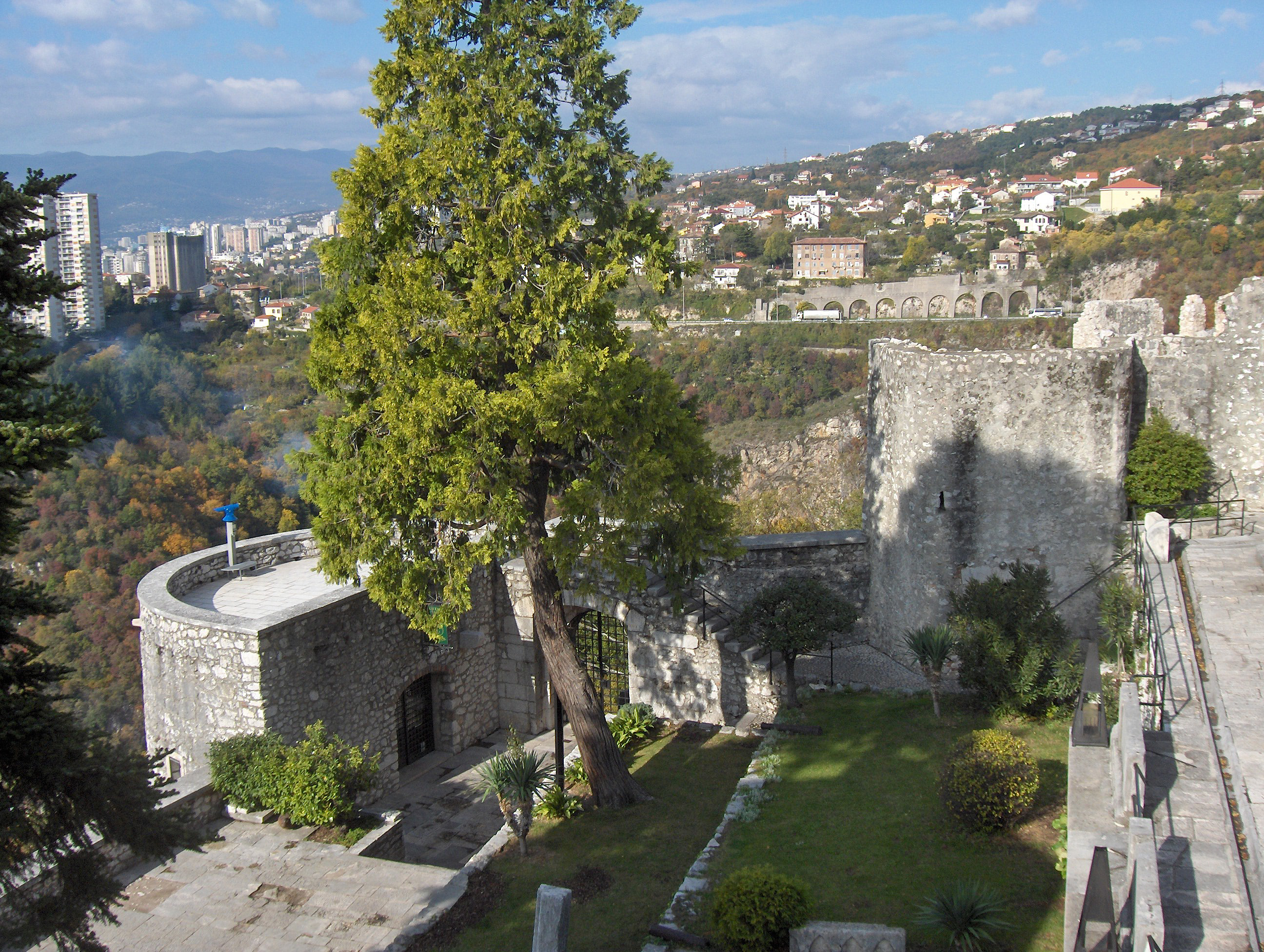 Trsat, Rijeka, Croatia